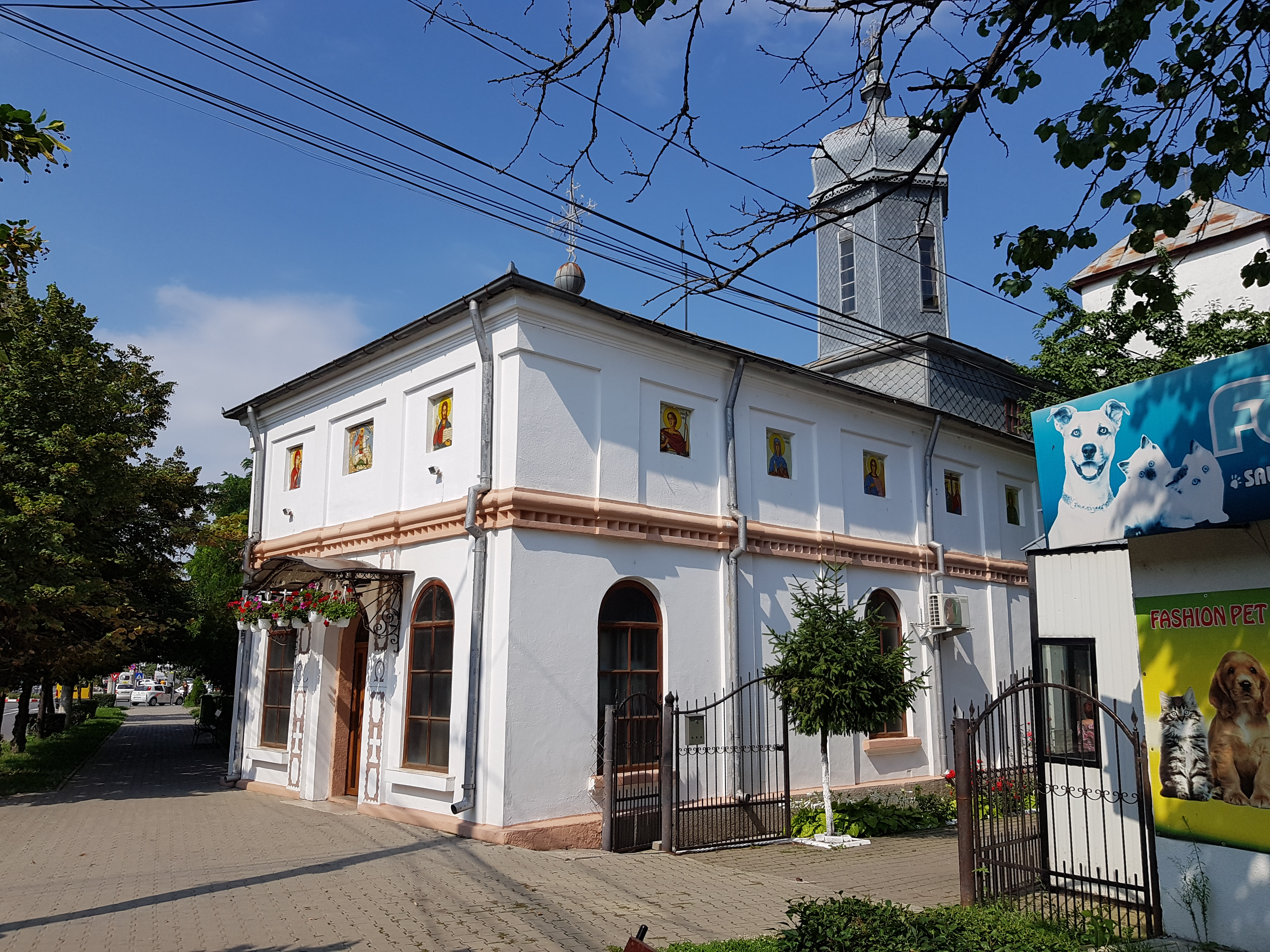 Biserica „Sf. Gheorghe” - Nord 01